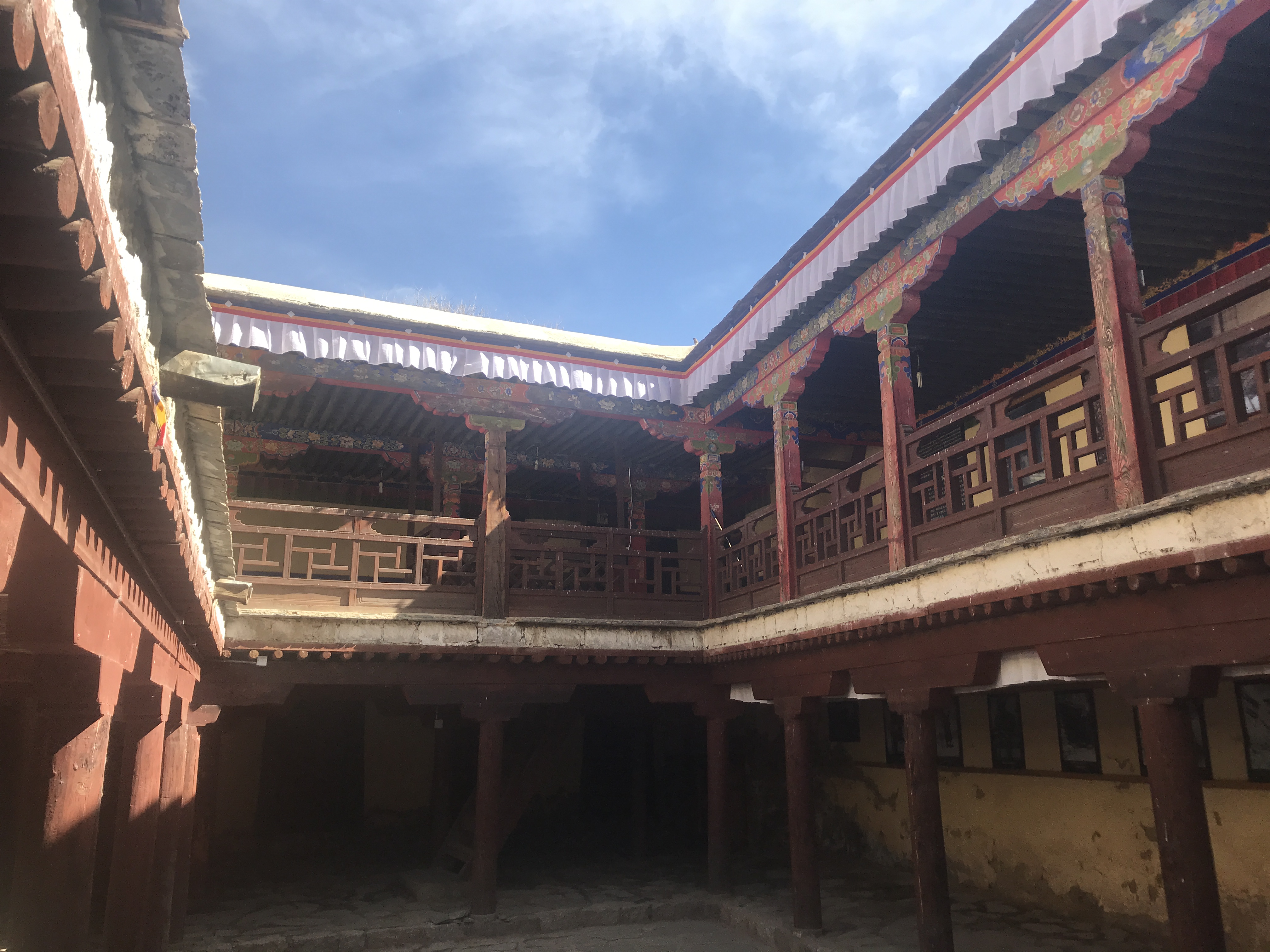 布达拉宫龙夏宅。